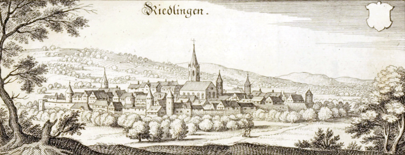 Panorama Ansicht der Stadt Riedlingen um 1642 aus der Topographia Germaniae von Matthäus Merian